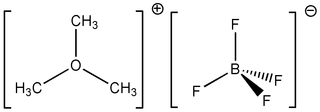 Struktur des Meerweinsalzes